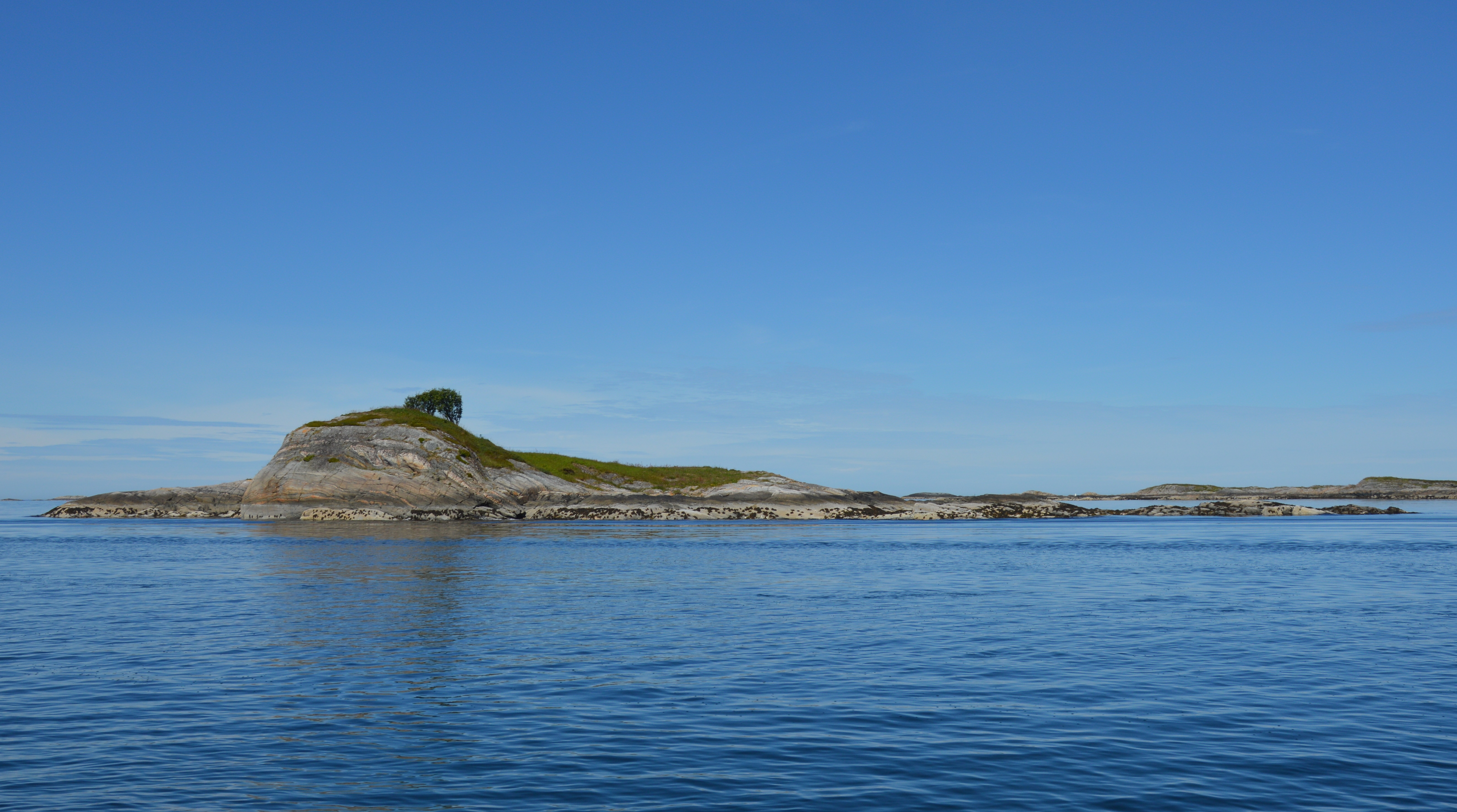 Seiskjæret